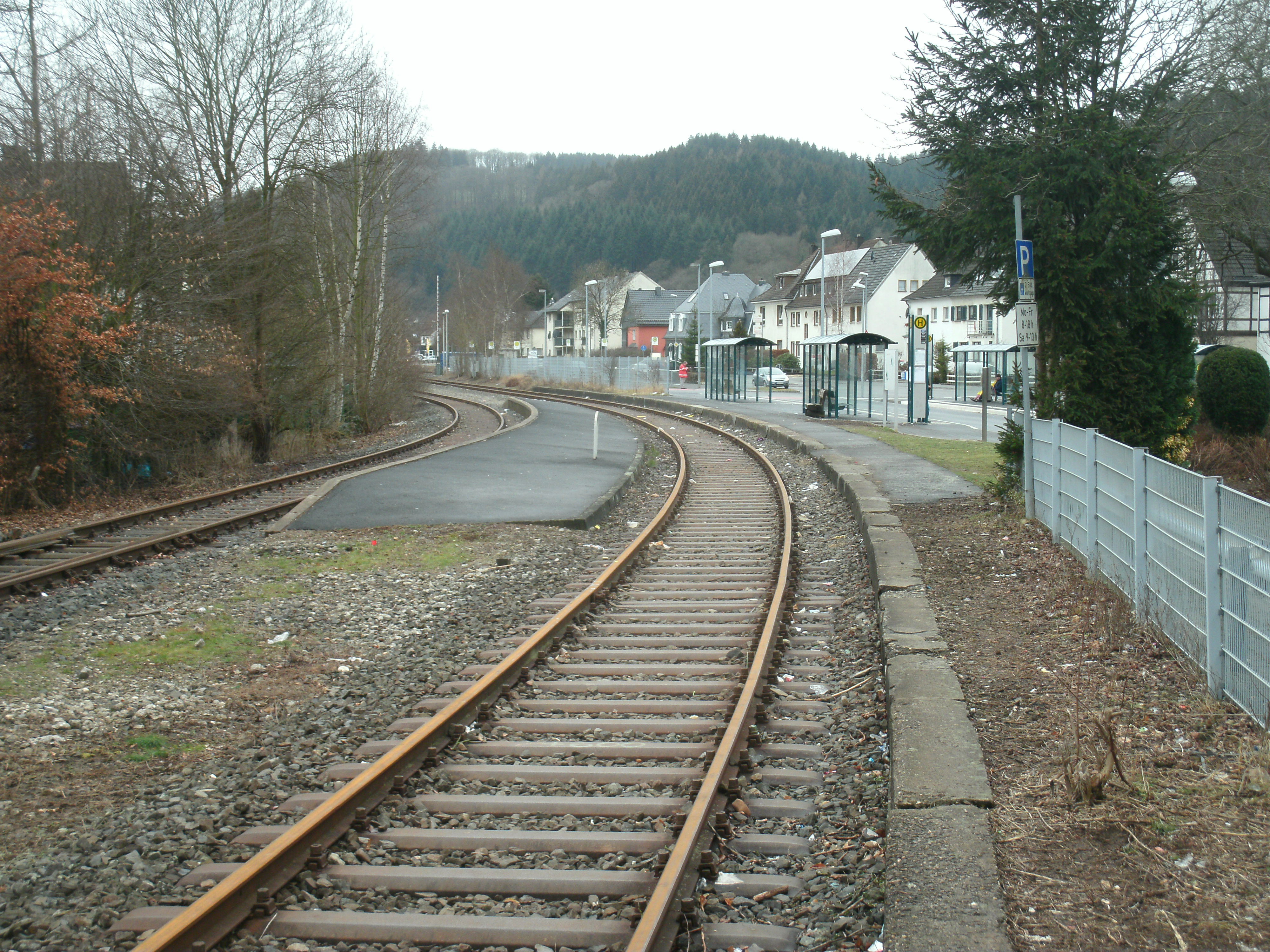 Der Bahnhof Schleiden (Eifel) an der touristisch genutzten Oleftalbahn (Kall-Schleiden-Hellenthal), rechts der angrenzende Busbahnhof